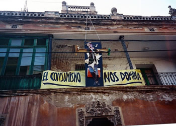 El consumismo nos domina, Barcellona (Spagna), immagine sulla facciata di un palazzo. Author:myself